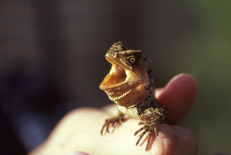 Enyalioides palpebralis